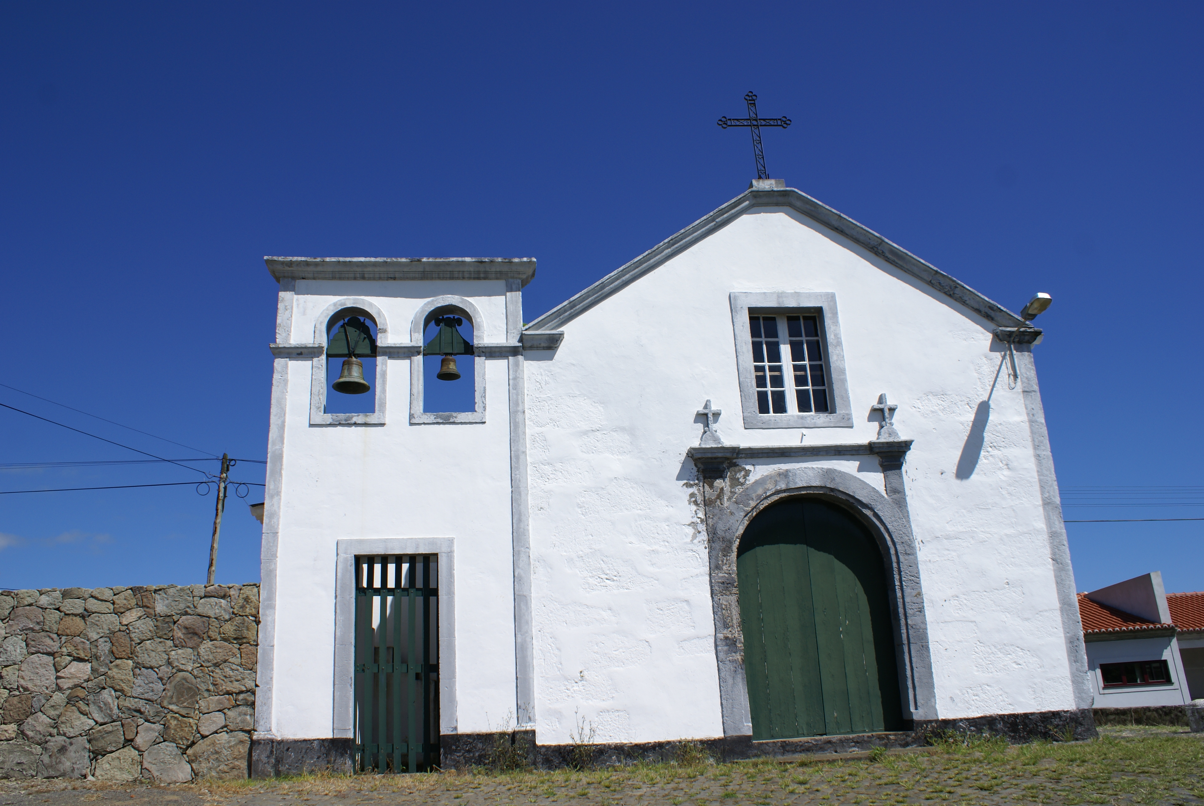 Ermida de Nossa Senhora da Luz, São Mateus da Calheta, Angra do Heroísmo, Arquivo de Villa Maria, ilha Terceira, Açores